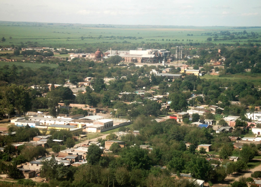 Vista aérea de la localidad de La Florida, Depto. Cruz Alta, Tucumán.